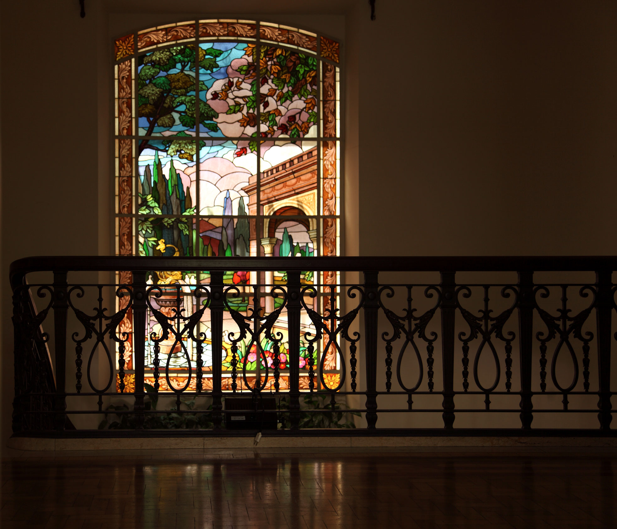 CASA DAS ROSAS - Detalhe Vitral interno